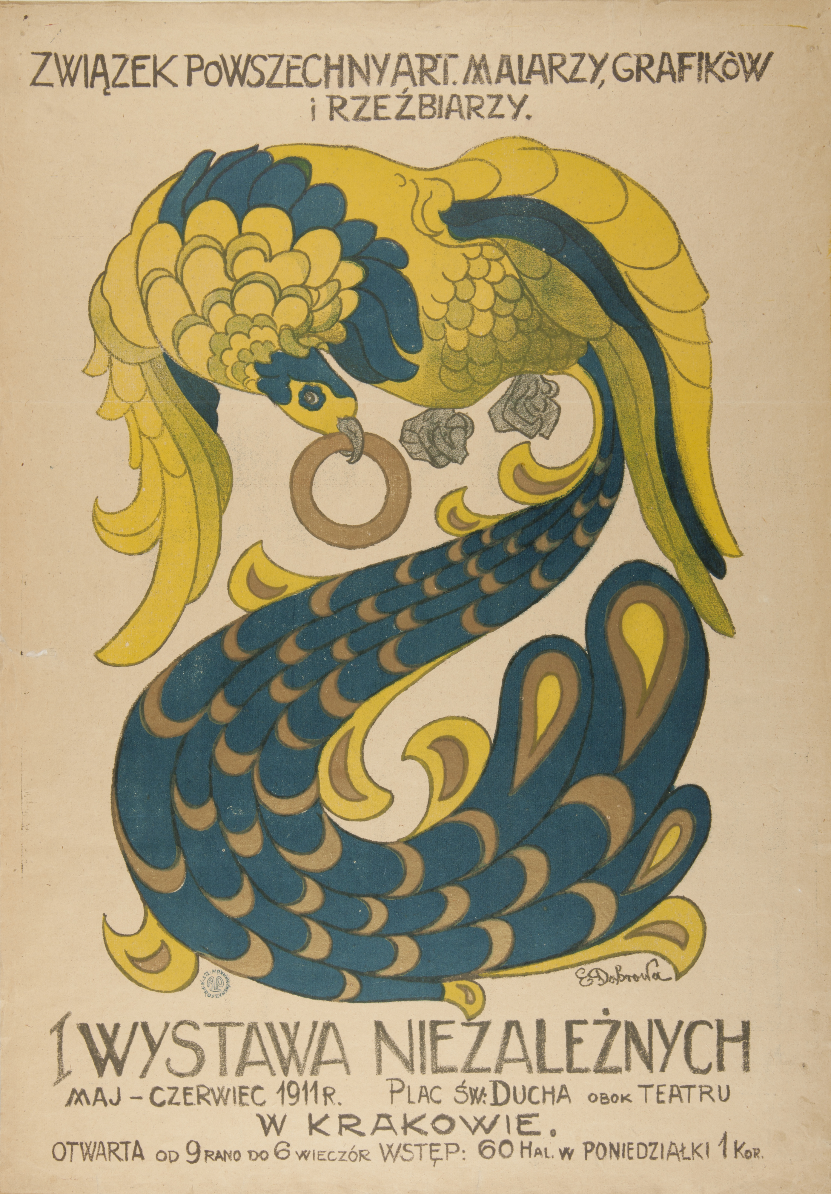 Ludwik Eugeniusz Dąbrowa-DąbrowskiI, I Wystawa Niezależnych, Kraków 1911